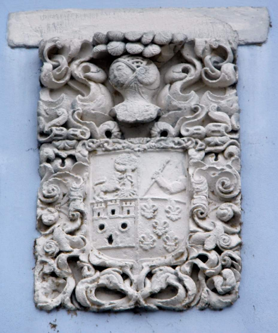 Ciaño (Langreo) - Casa de los Alberti